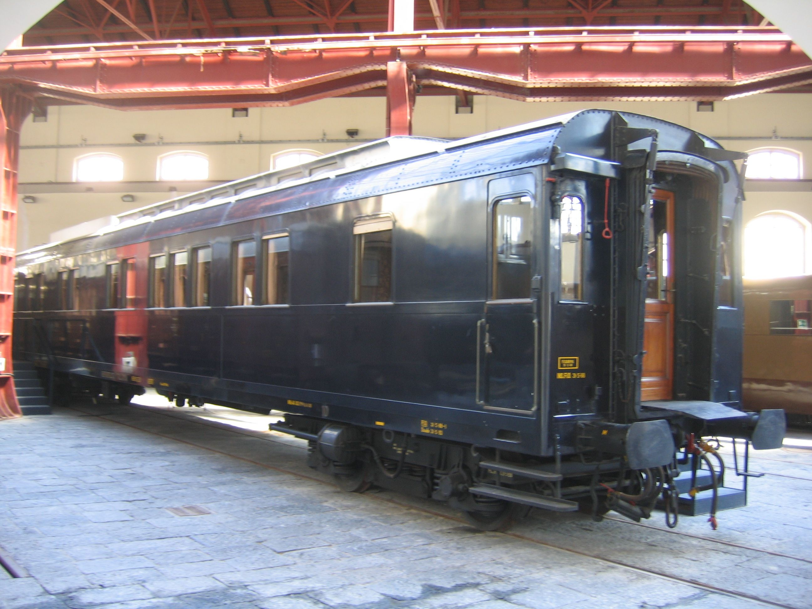 Italienischer Königswagen 1929